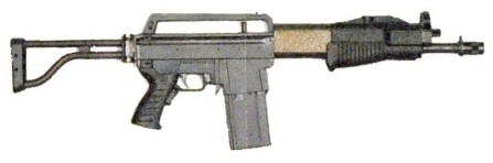 Fucile ad anima liscia Franchi Spas 15, Esercito italiano